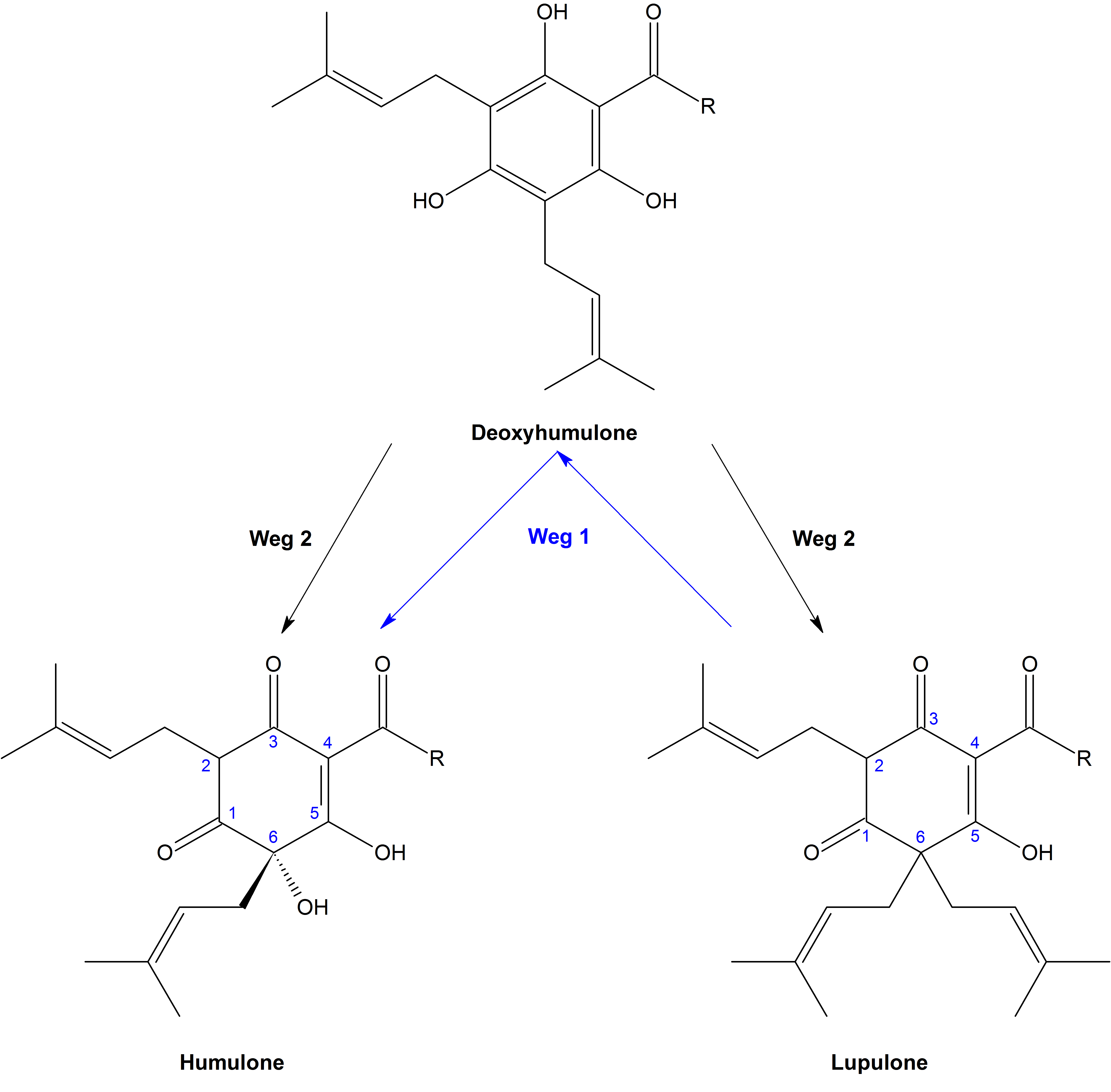 Mögliche Biosynthese von Humulonen und Lupulonen aus Desoxyhumulon